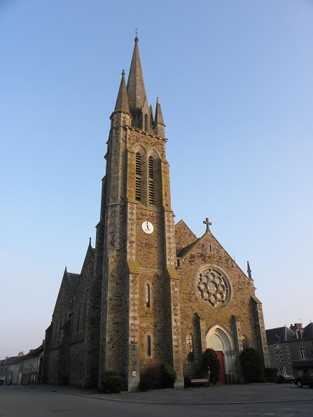 Église Saint-Pierre de Médréac.